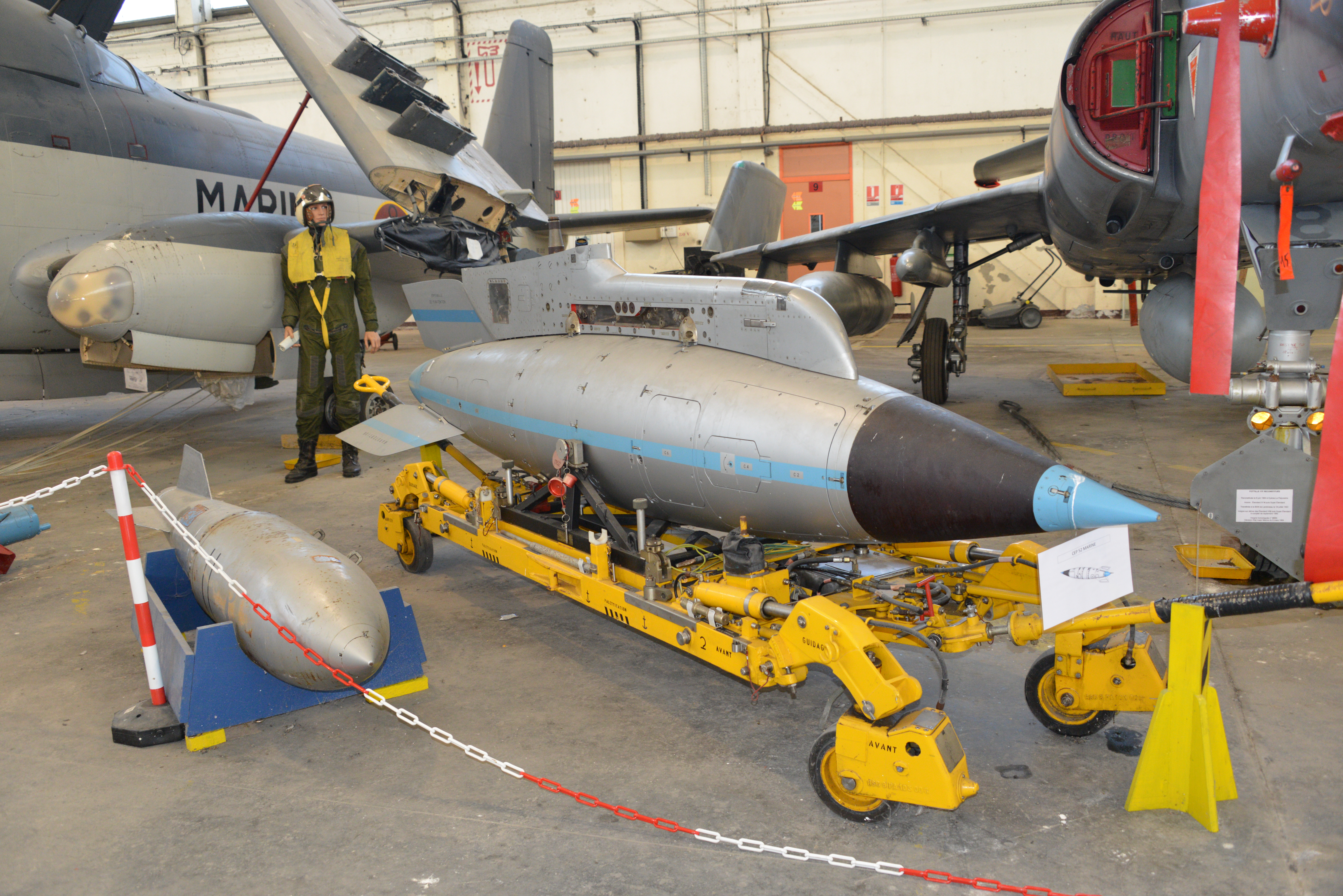 Pièce des collections du musée de l'aéronautique navale de Rochefort-sur-Mer : une bombe nucléaire française tactique aéroportée CP 52 (AN 52) Marine (1973, arme retirée en 1991). Rochefort-sur-Mer, Charente-Maritime, France.